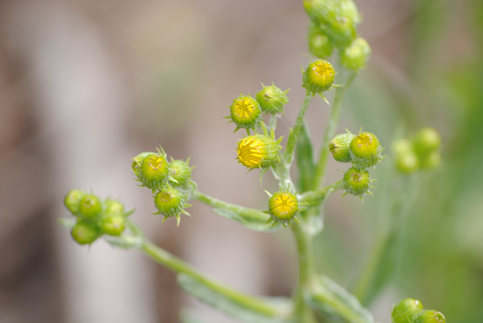 Senecio girsebachii. Asteraceae. Fotos tomadas al margen del Lago de Palmar entre gramíneas, departamento de Soriano, Uruguay. Senecio grisebachii var. grisebachii.